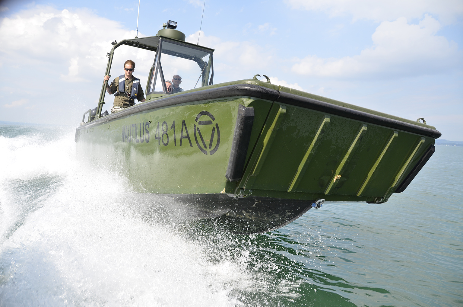 Ein Pionierboot am Bodensee in voller Fahrt.